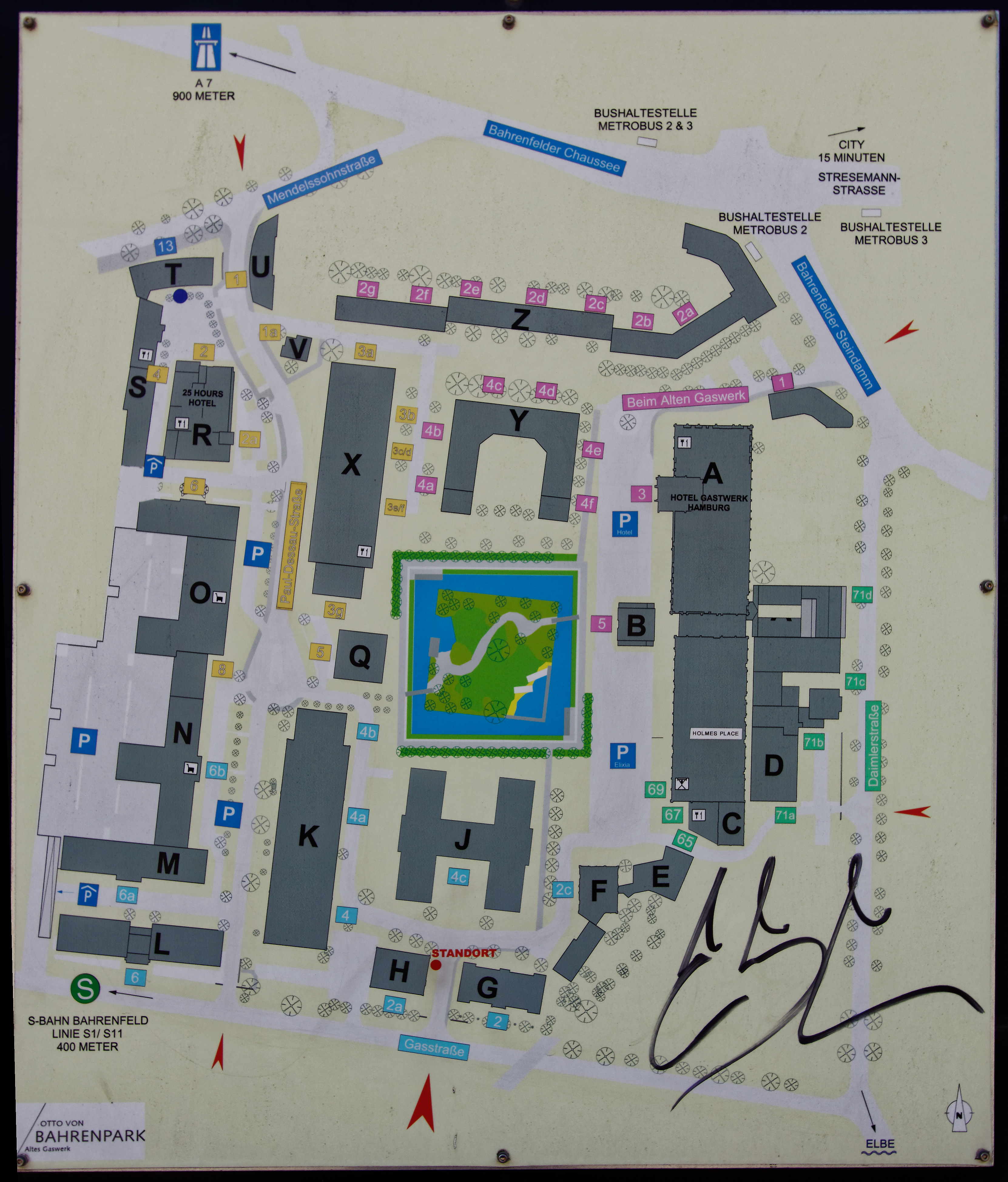 Hamburg-Bahrenfeld, Gelände des ehemaligen Gaswerks, Plan "Otto von Bahrenpark" Stand 2016This is a photograph of an architectural monument.